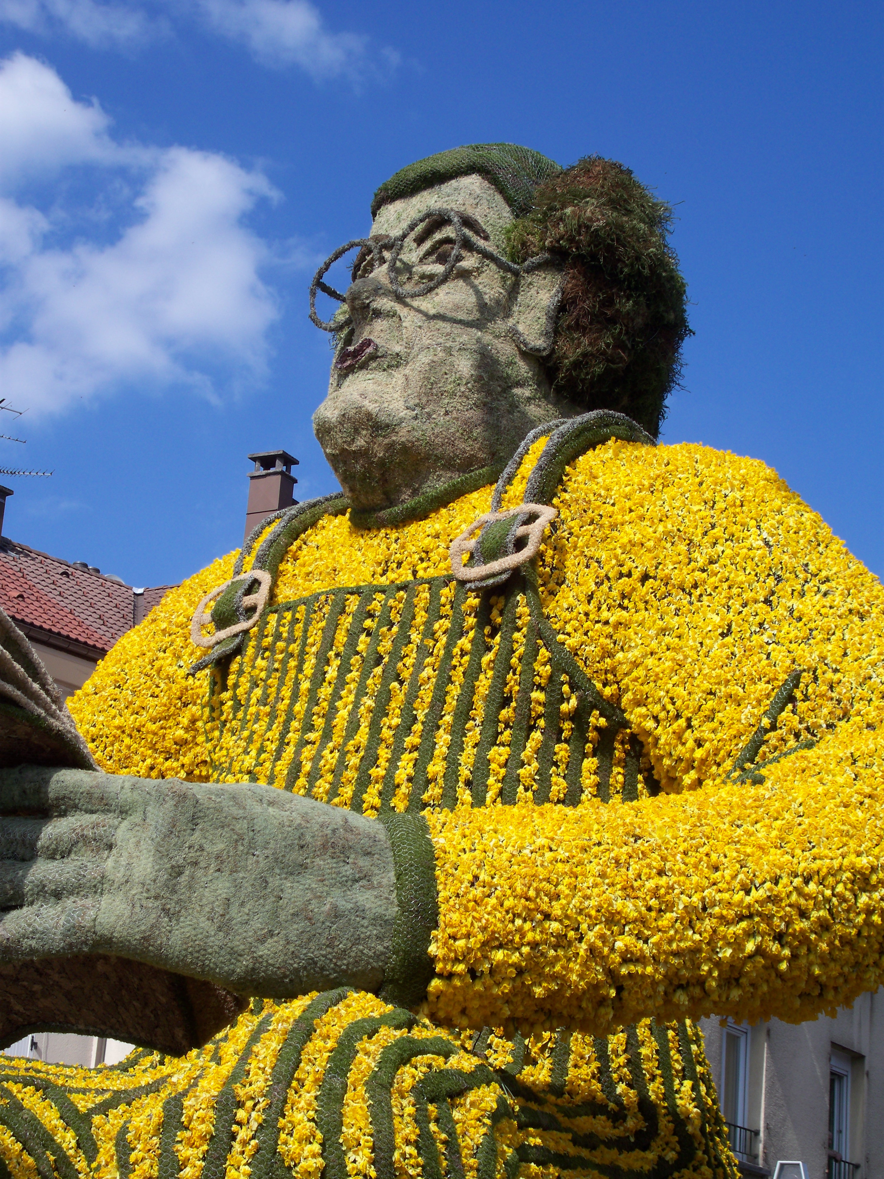 Défilé d'un char (représentation de Coluche) durant la fête des Jonquilles de Gérardmer de 2011.